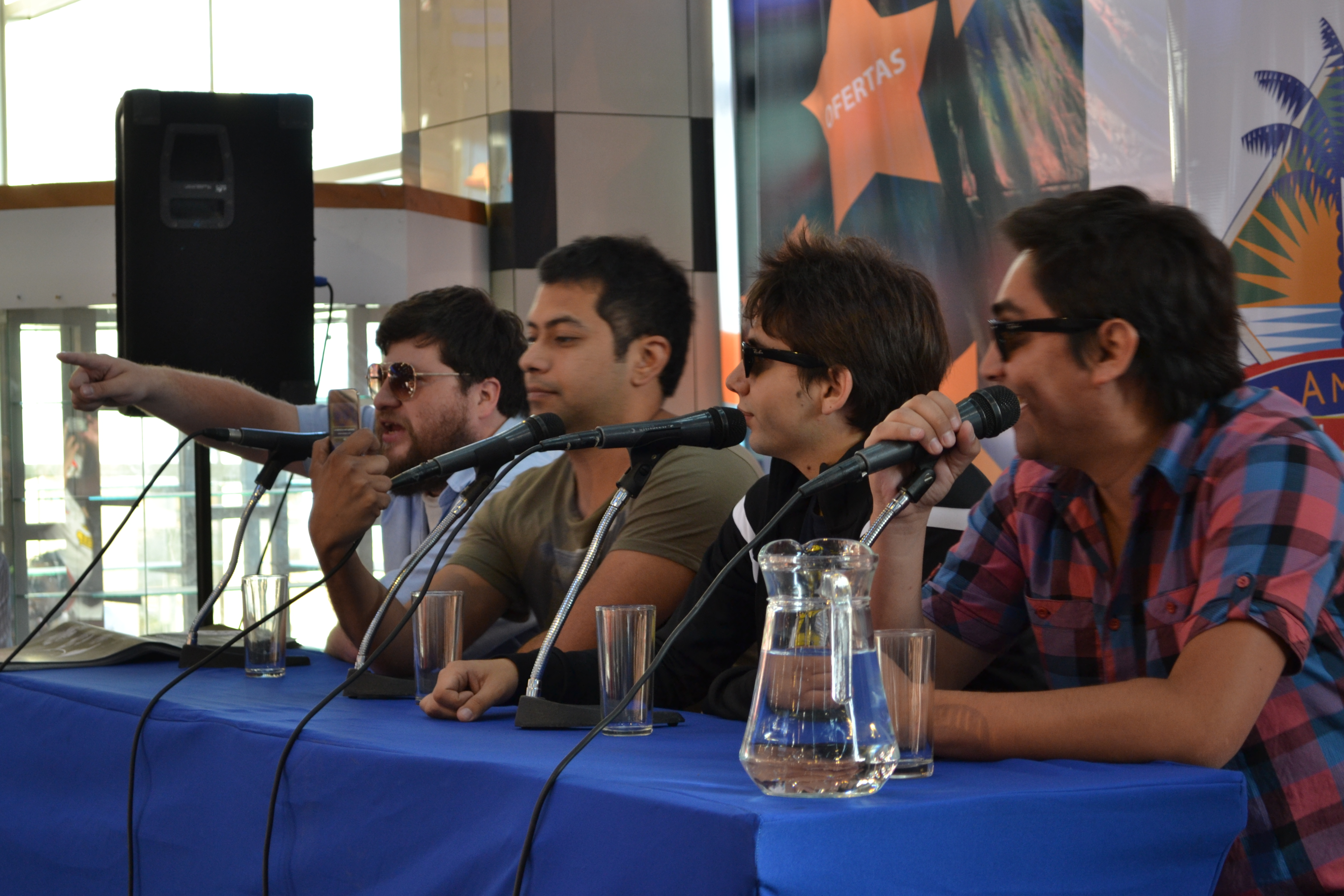 Integrantes de "El Club de la Comedia", programa de televisión chileno.